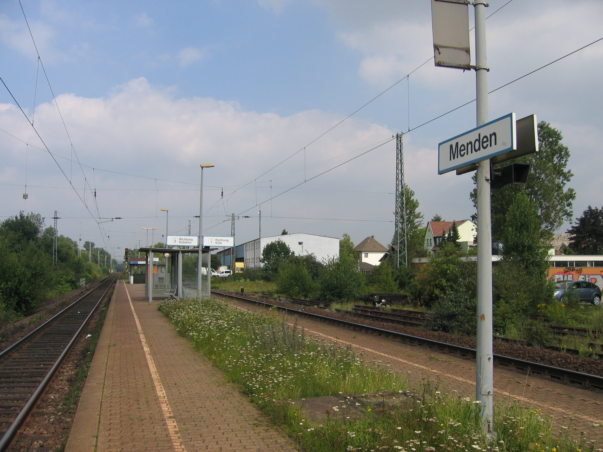 Bahnhof Menden, St. Augustin